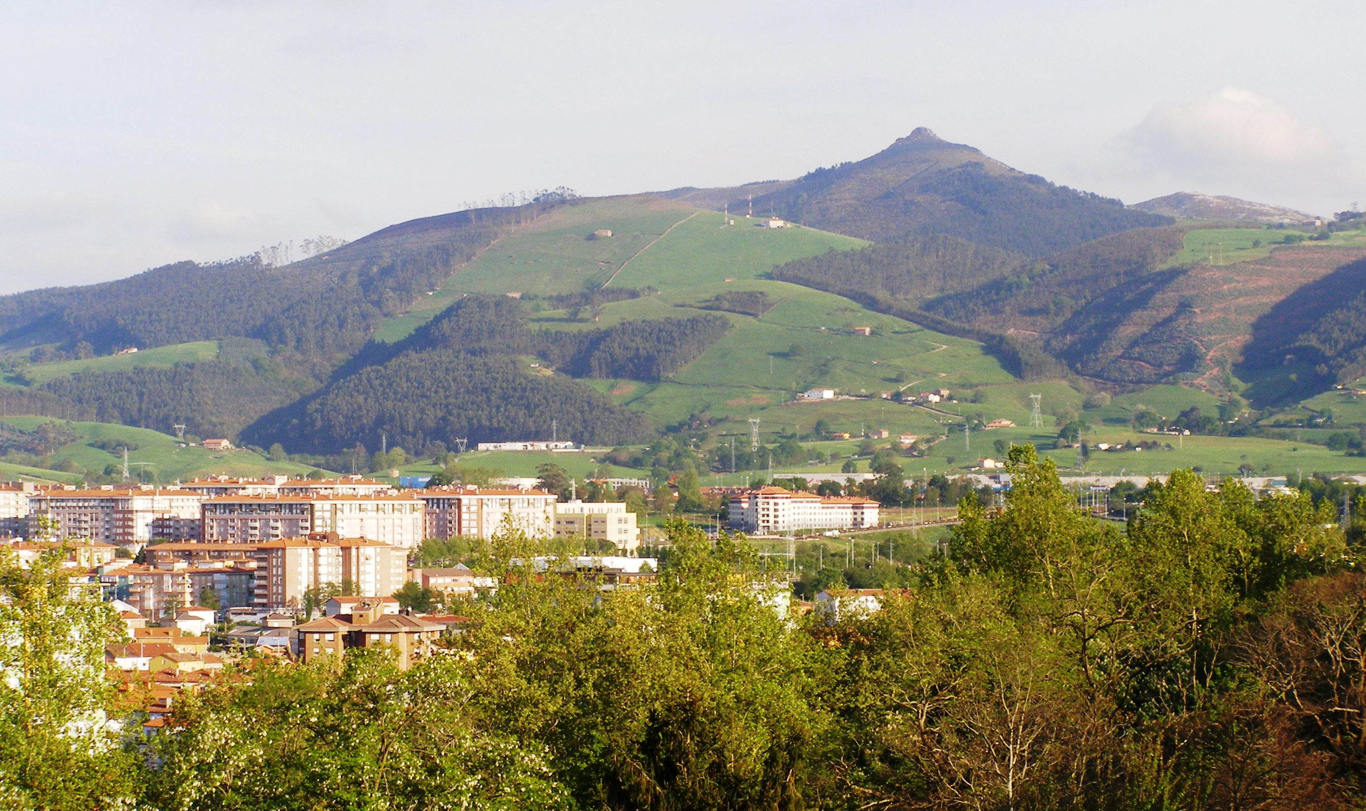 Barrios y pueblos del sur de Torrelavega y el Monte Dobra